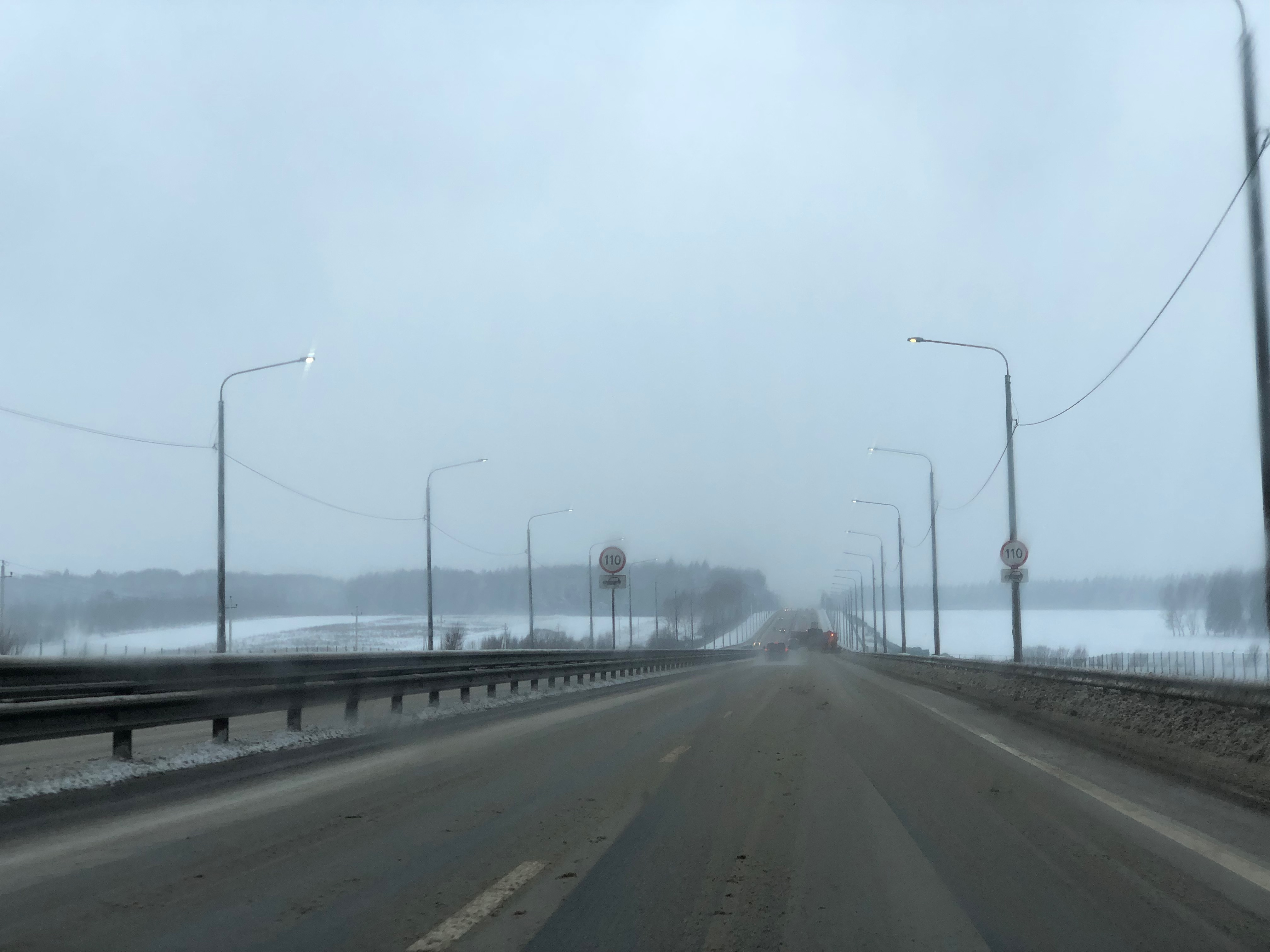 М3